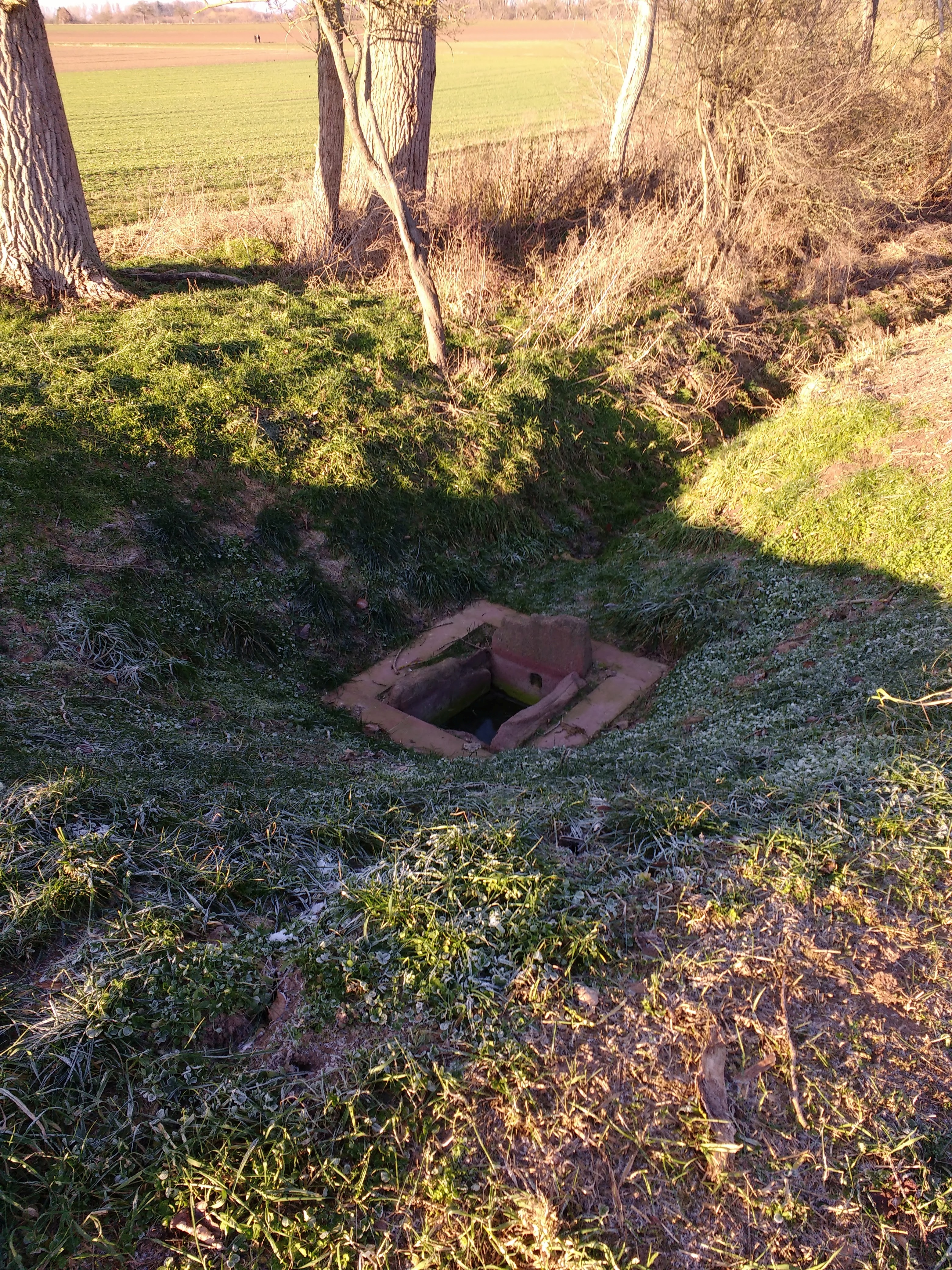 Grüner Born: Quelle der Bieber in der Gemarkung Götzenhain.